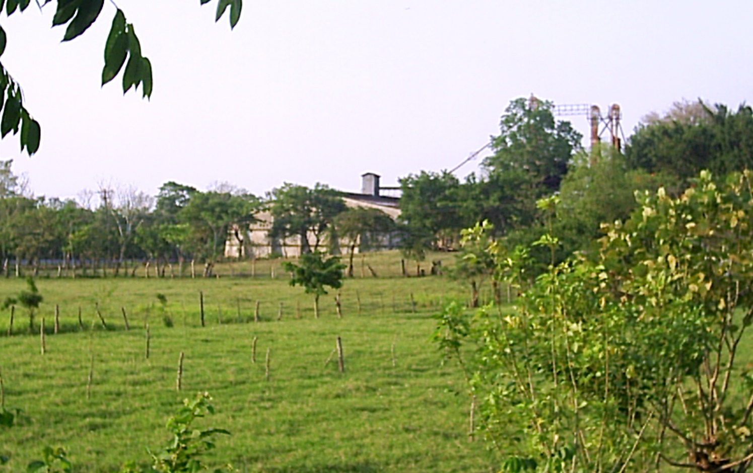 Imagen de los antiguos campos de arroz y la Arrocera San Silvero en la Agencia EL Desengaño, Tuxtepec, Oaxaca.